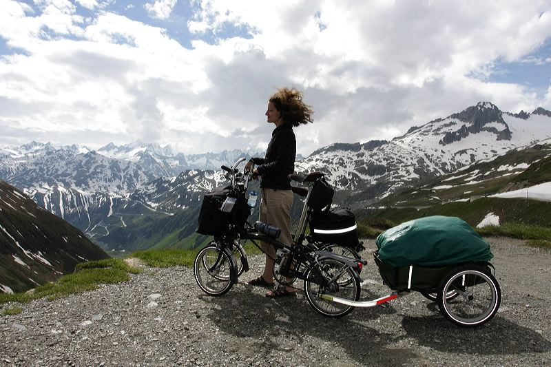 Cycliste avec son vélo Brompton regardant la vallée du Rhône depuis le col de la Furka 2436m en Suisse avec une remorque Y-Frame small.